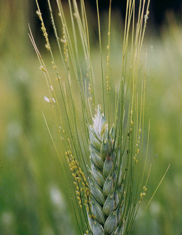 Cereal d'hivern afectat per pugó.